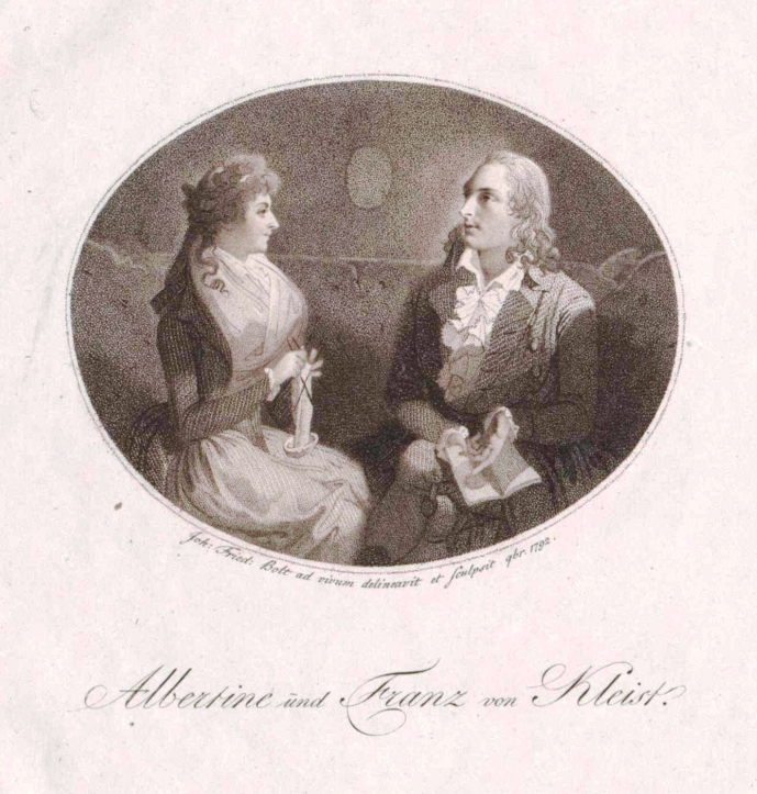 Albertine (1774–1855) und Franz Alexander von Kleist (1769–1797)